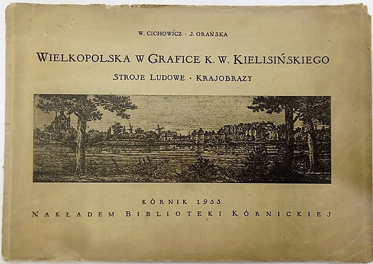 W. Cichowicz, J. Orańska "Wielkopolska w grafice K. W. Kielesińskiego. Stroje ludowe. Krajobrazy", Kórnik 1955, Nakładem Biblioteki Kórnickiej